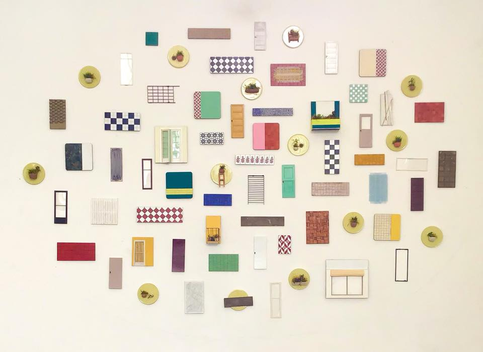 Instalación